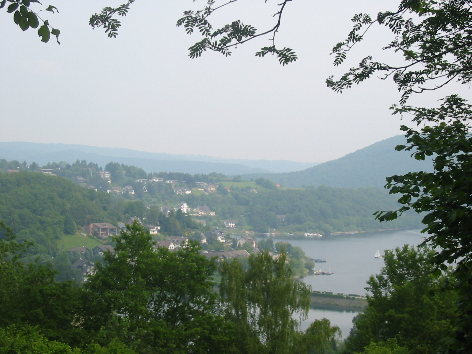 Rurberg, Eifel/Germany